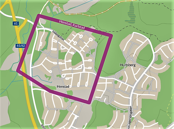 Bilden visar gränsdragningen för området Henstad, Karlstad